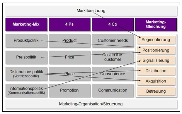 Zusammenhang zwischen Marketing-Mix, 4 Ps, 4Cs und Marketing-Gleichung